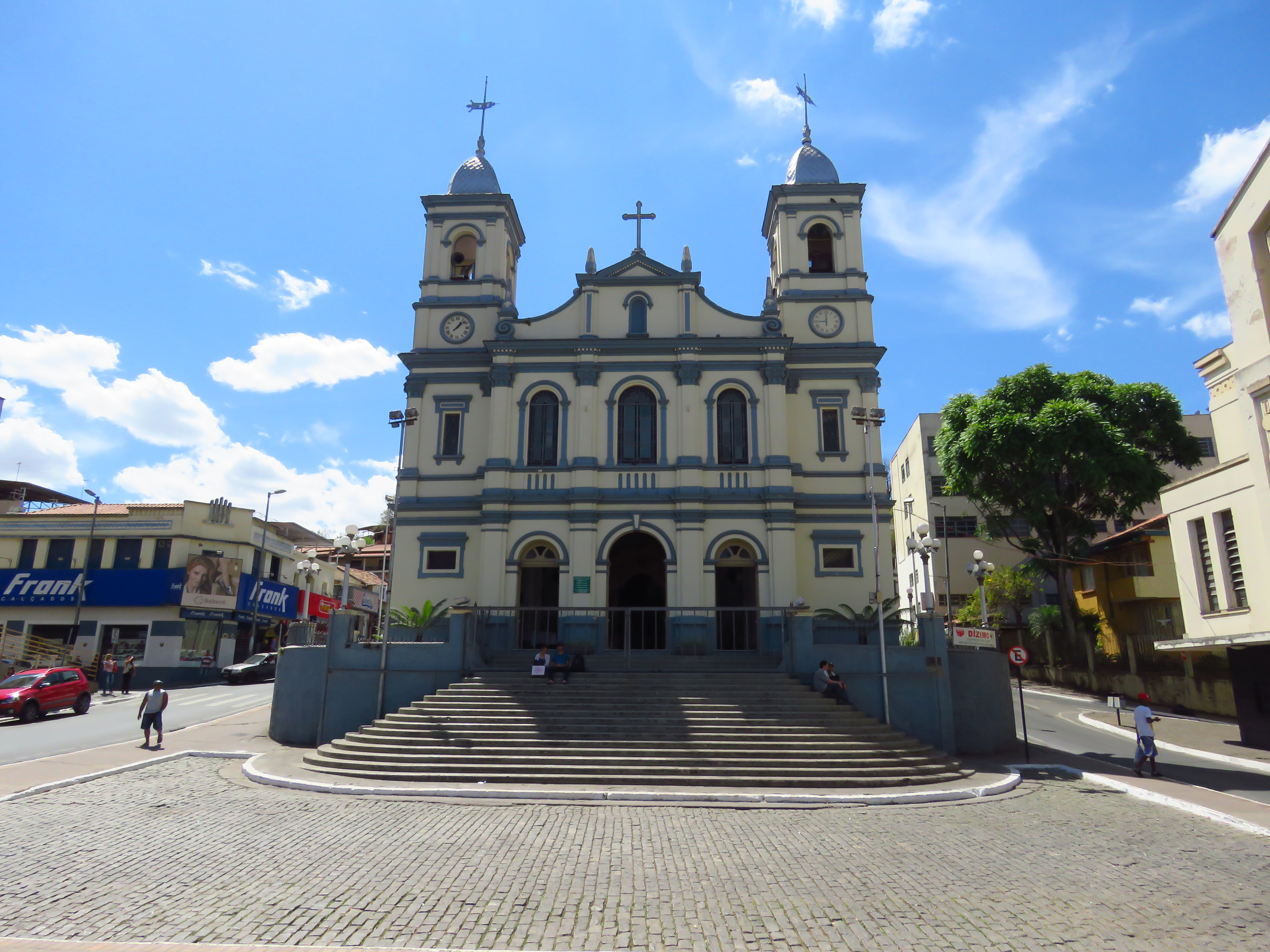 Cultural propertyIgreja Matriz de Nossa Senhora do Pilar, Nova Lima, Minas Gerais, Brazil Q10300073, P727